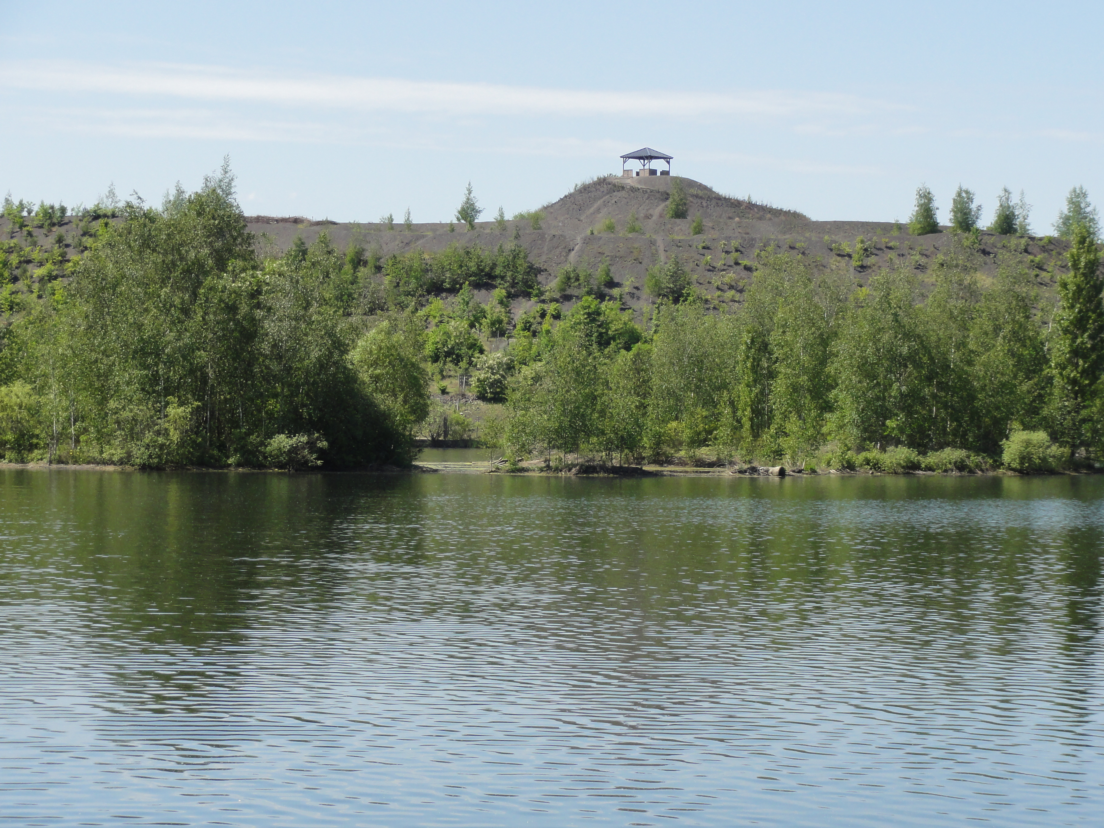 Terril no 144 dit Rieulay, fosses De Sessevalle et Lemay de la Compagnie des mines d'Aniche dans le bassin minier du Nord-Pas-de-Calais, Rieulay et Pecquencourt, Nord, Nord-Pas-de-Calais, France. Le terril no 144 en majeure partie, ainsi que son lac, sont inscrits sur la liste du patrimoine mondial de l'Unesco le 30 juin 2012 et y constituent le site no 27.